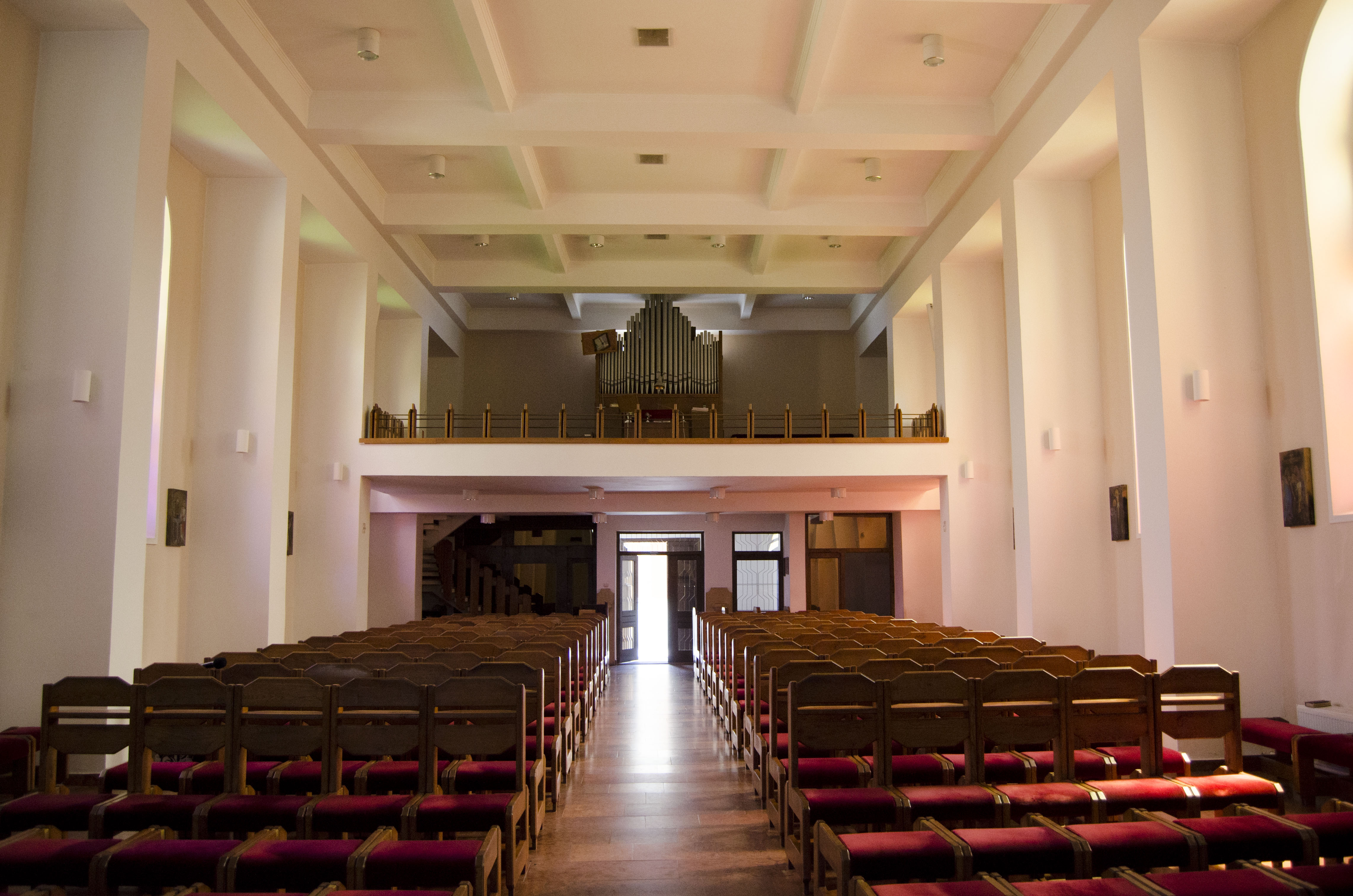 Kostol sv. Petra a Pavla v Barci interiér 2019.jpg